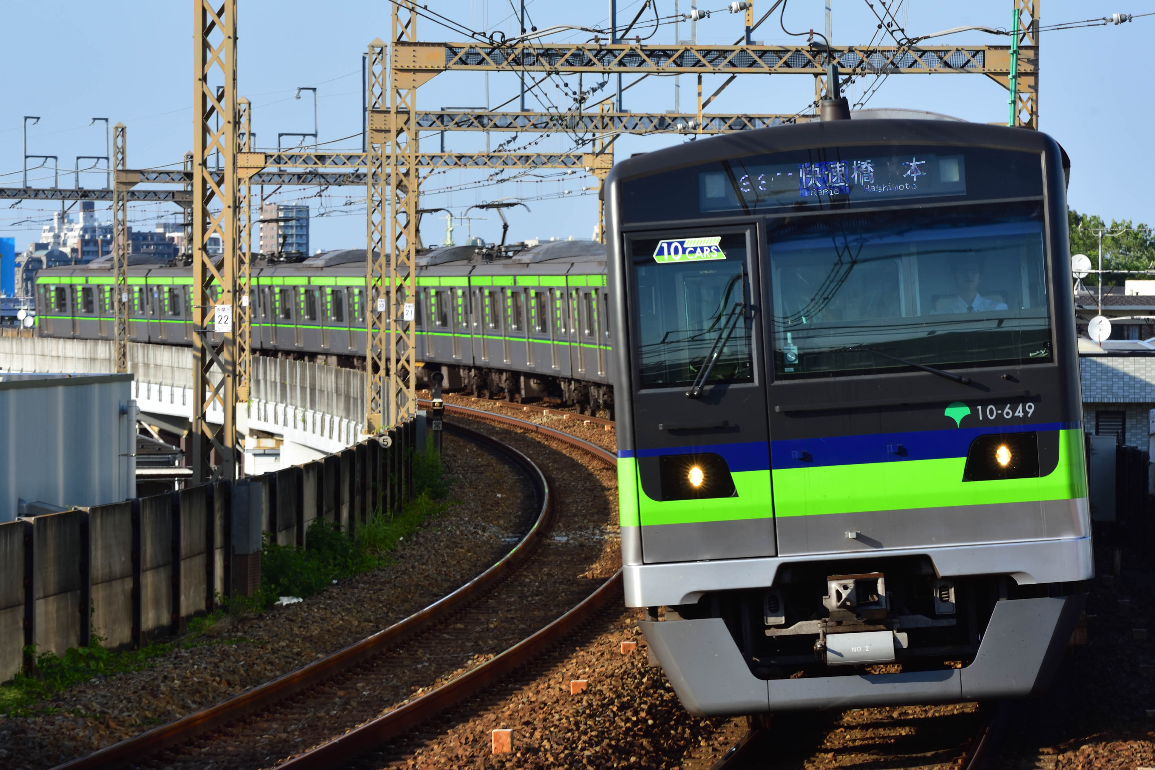 都営地下鉄10-300形。京王稲田堤駅。 Nikon D750